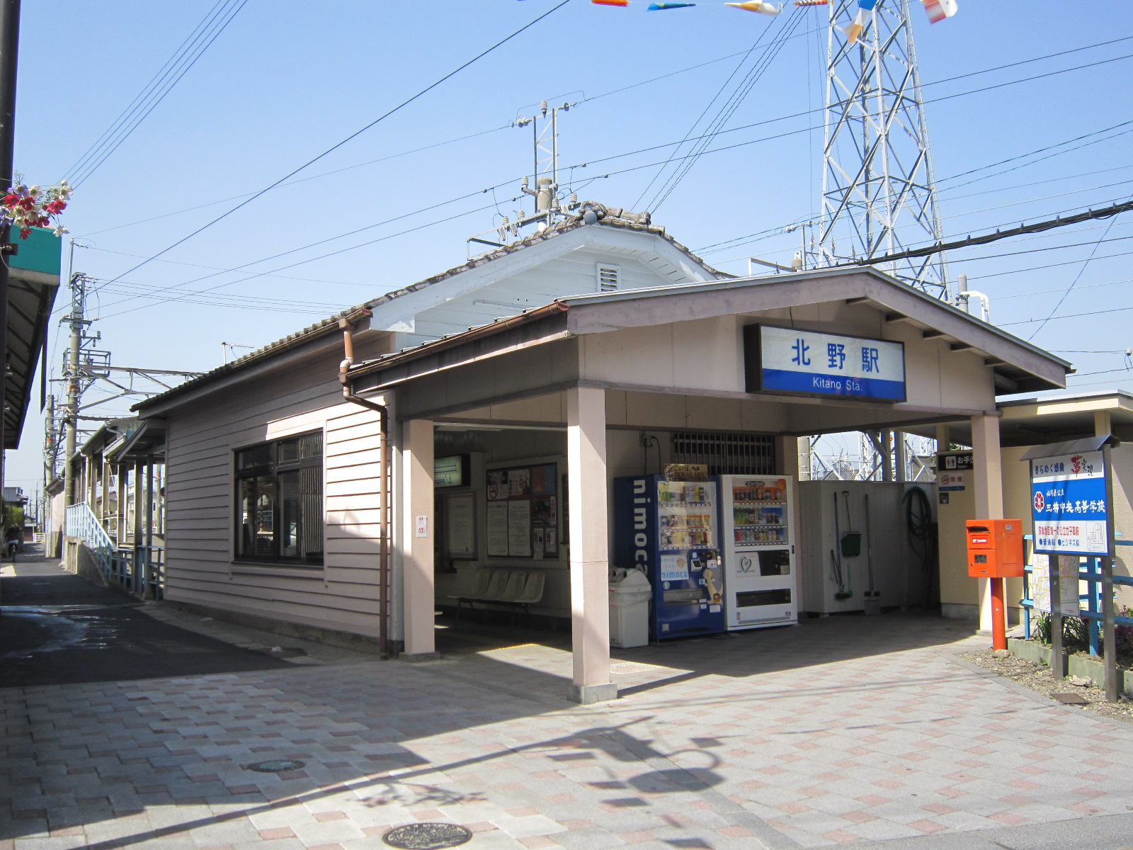 西鉄北野駅。駅前より。